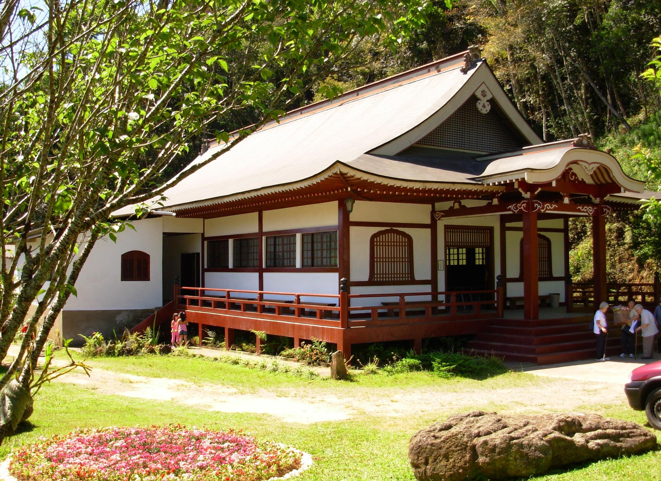 Templo Enkô-Ji, Itapecerica da Serra